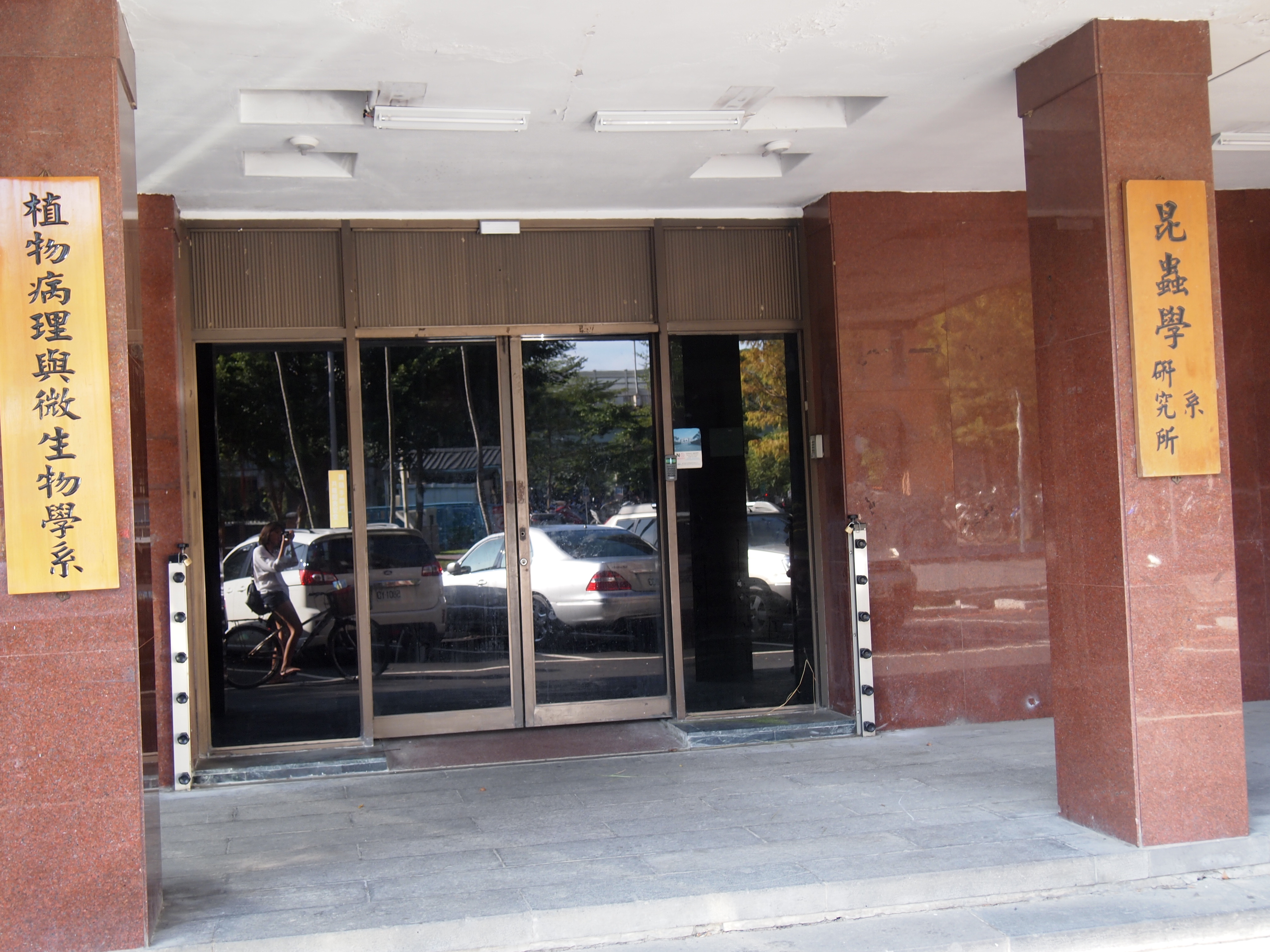 中文（台灣）: 國立臺灣大學中非大樓正門。